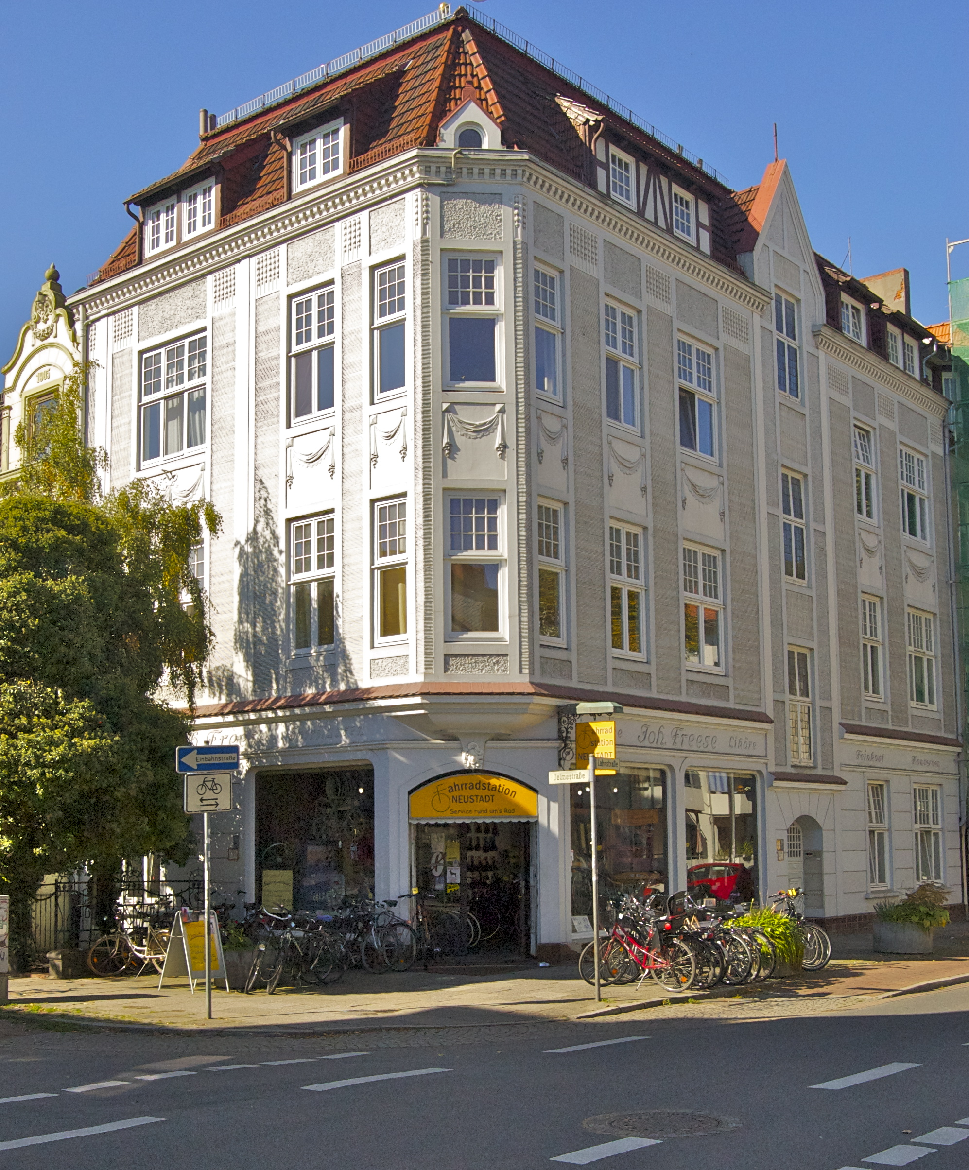 Mietshaus in Bremen, Lahnstraße 33.Das abgebildete Objekt ist ein geschütztes Kulturdenkmal in der Freien Hansestadt Bremen, mit der Nr. 0827 beim Landesamt für Denkmalpflege registriert.